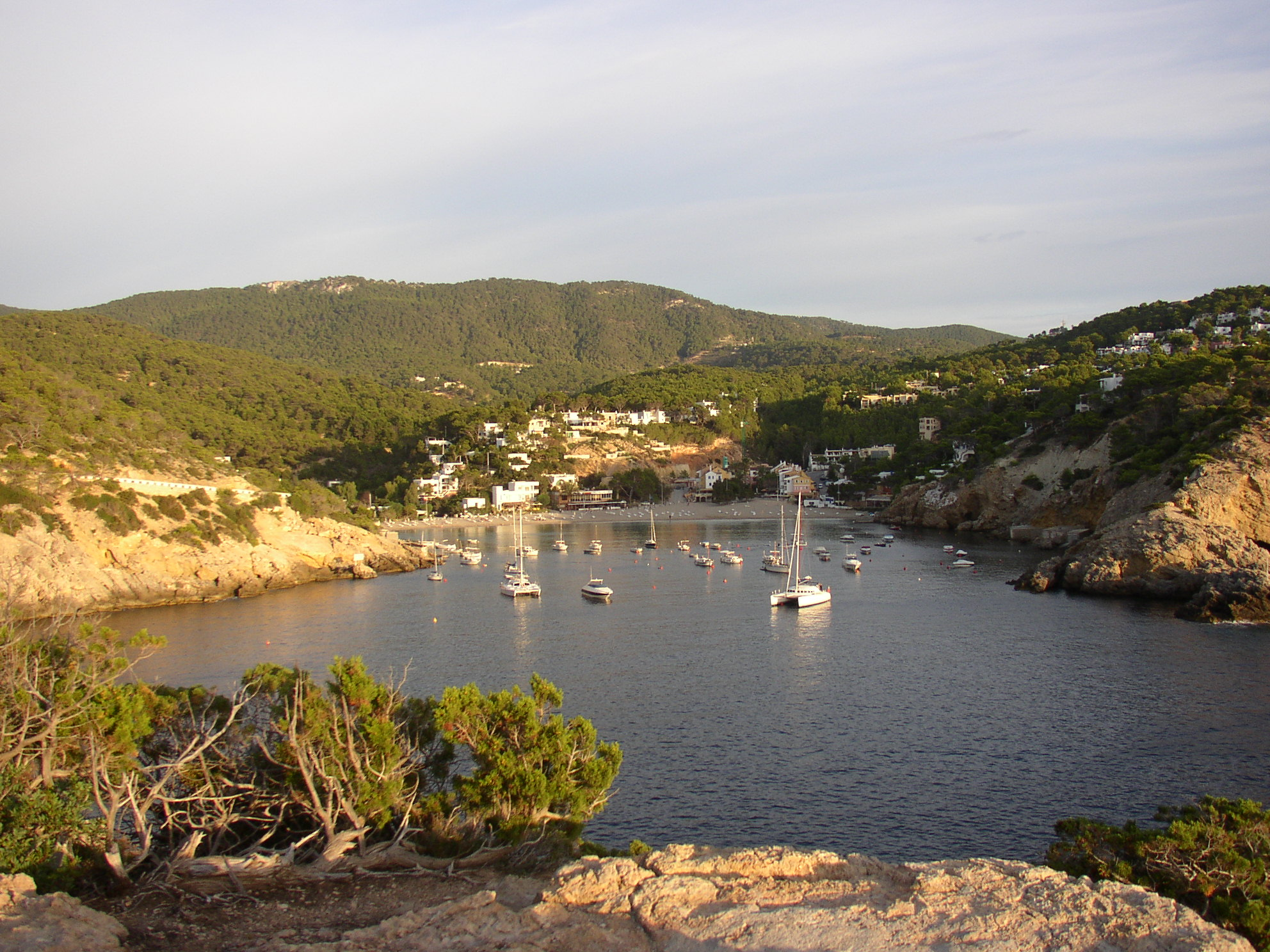 Ansicht aus Westen auf die Cala Vedella auf Ibiza